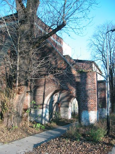 Browar Ludwika Anstadt Łódź